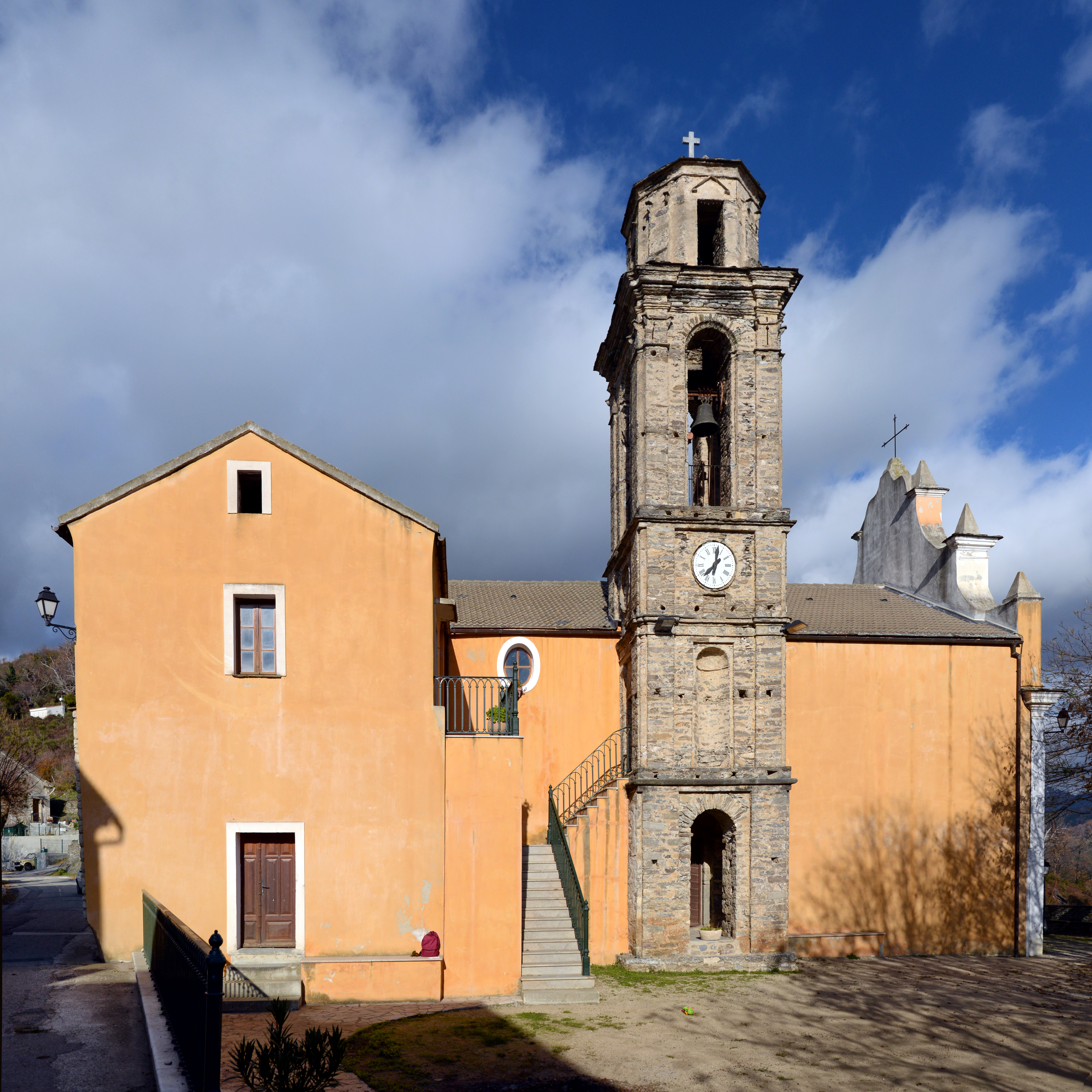 Pietraserena, Rogna (Corse) - Église paroissiale Saint-Roch (chjesa San Roccu)